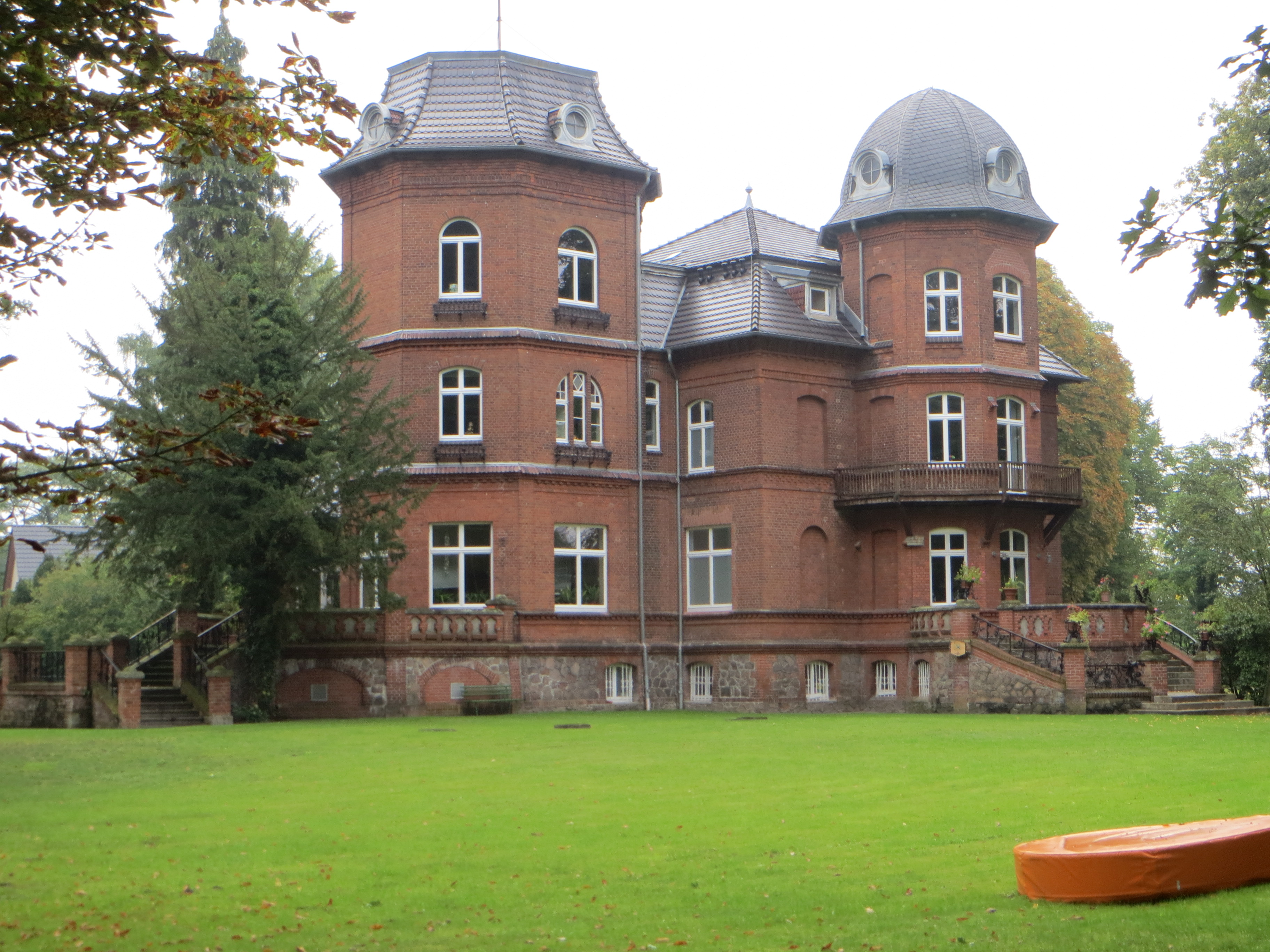 Straße des Friedens 8-8c in Neu Kaliß, Mecklenburg; Haus Viktor im Bausch-Park (ehemalige Villa des Unternehmers Viktor Bausch), Gartenseite; unter Denkmalschutz